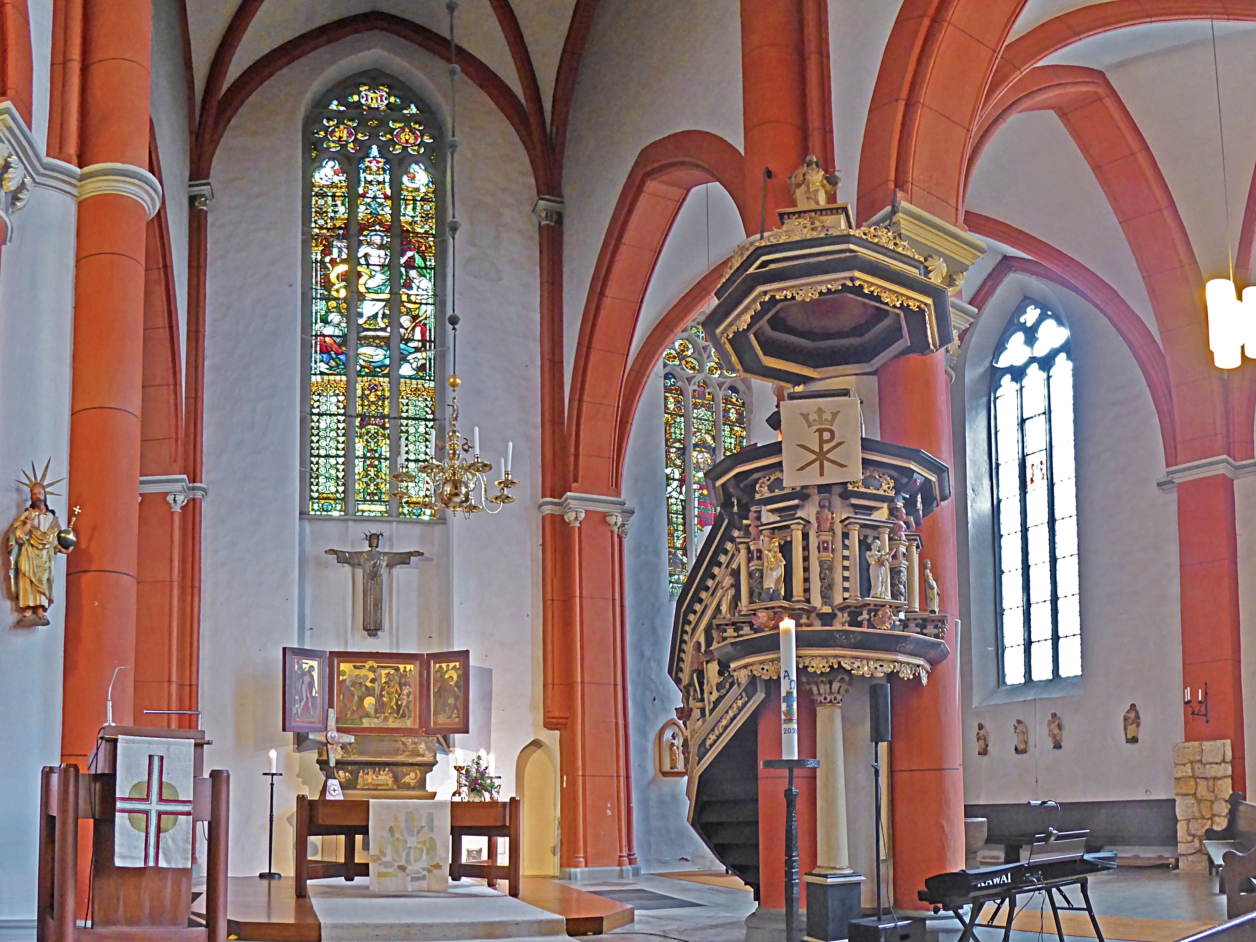 Chor mit gotischem Flügelaltar und Renaissance-Kanzel (1637) in der Marktkirche St. Jacobi (Einbeck)